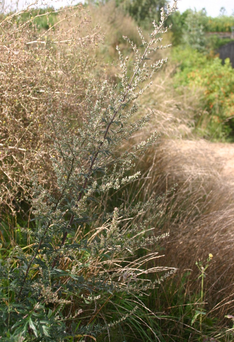 Artemisia vulgaris: Fruit bearing plant.